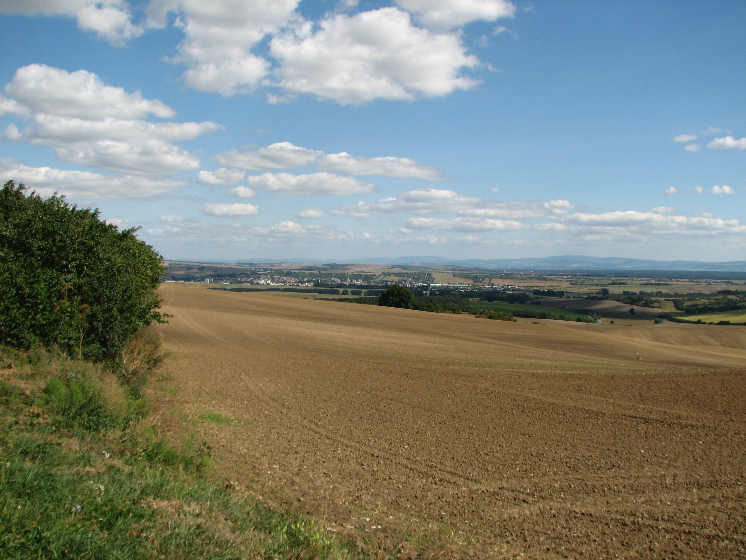 Kyjov - pohled z Babího lomu